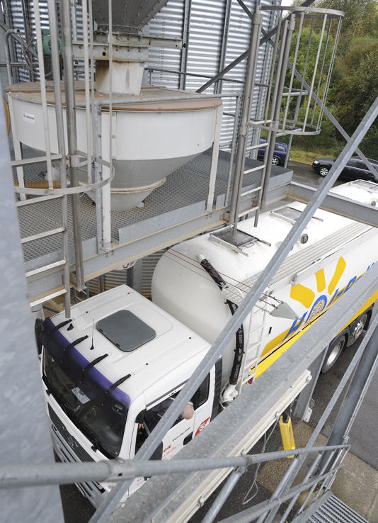 Holzpelletproduktion bei WestPellets in Titz-Ameln Zum Beginn der ersten nordrhein-westfälischen Woche der Holzpellets informierte sich NRW-Klimaschutzminister Johannes Remmel am 6. Oktober 2011 über die Produktion von Holzpellets. Als achte Station seiner Klimaschutztour hatte er dafür die Holzpelletproduktion der WestPellets GmbH &Co. KG im niederrheinischen Titz-Ameln ausgewählt. Weitere Informationen unter: Flickr tags: Klimaschutztour; 2011; NRW; EANRW; Minister; Johannes Remmel; Klimaschutz; EnergieAgenturNRW; Holzpellets; WestPellets; Energiewende; Erneuerbare